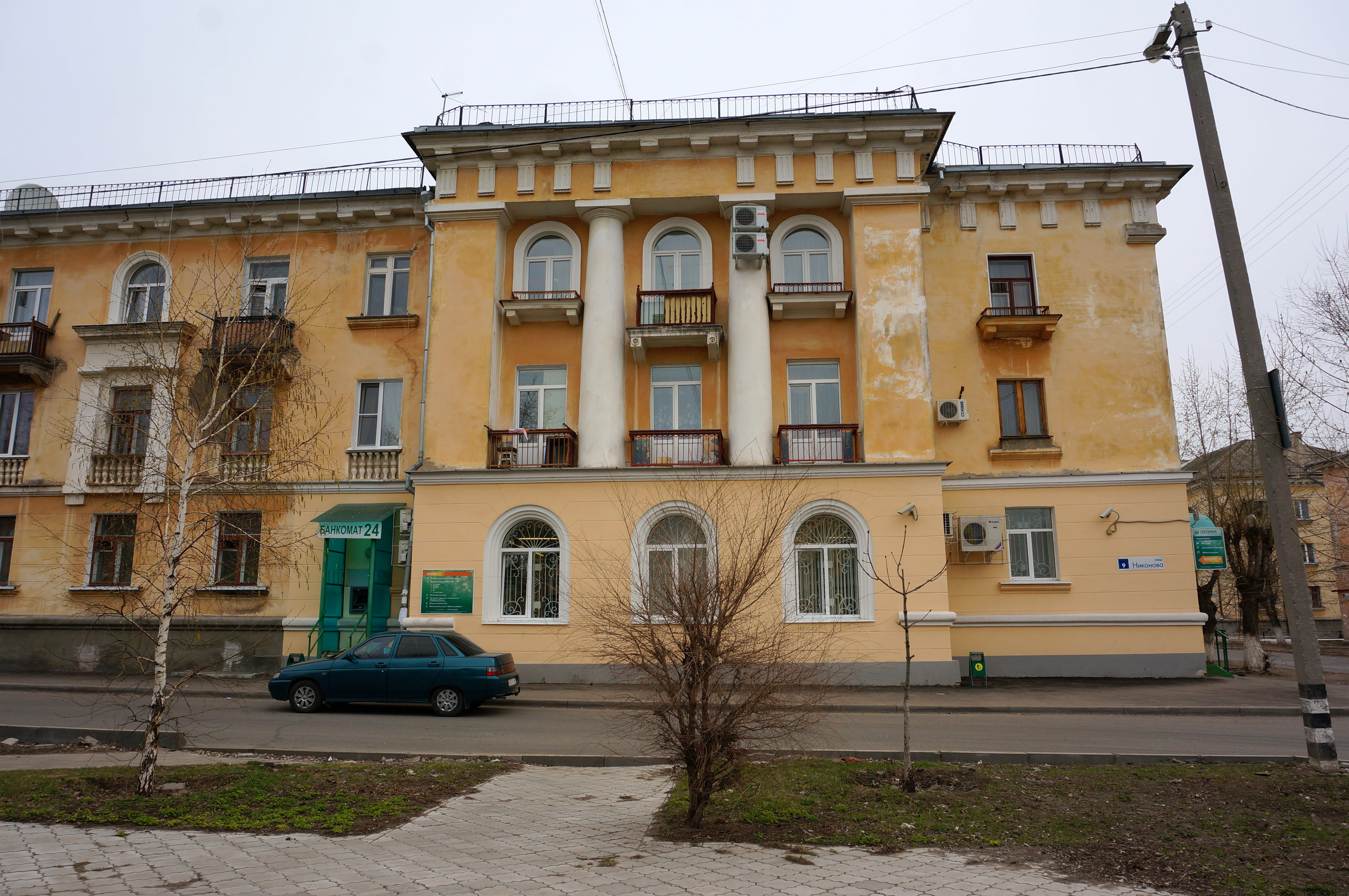 Ул. Никонова 9/Крылова 4, Тольятти, Россия. Трехэтажное жилое здание построено в 1957 году. Здание Г-образной формы, формирует юго-западный угол квартала. Главный фасад выходит на улицы Никонова и Крылова. Фасад представляет собой стилизацию под русскую дворцовую архитектуру XVIII века. Автор — архитектор В. Мухин